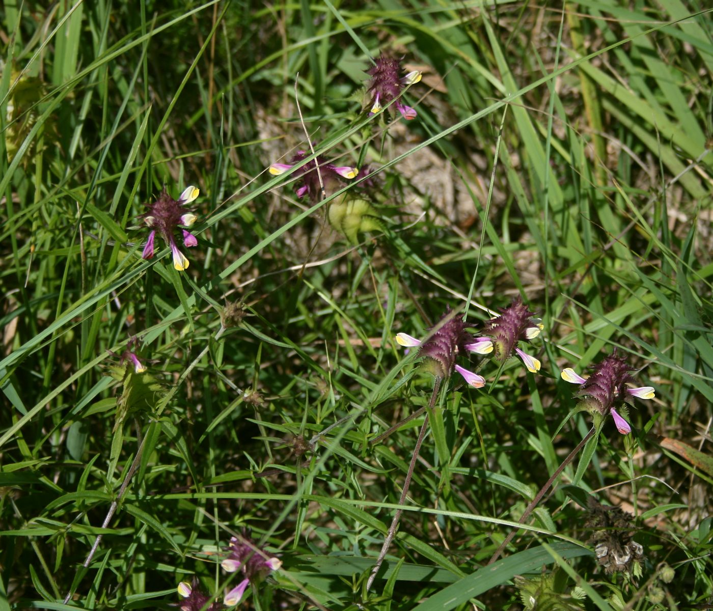 Kamm-Wachtelweizen (Melampyrum cristatum), Sommerwurzgewächse (Orobanchaceae) - Österreich/Austria/Autriche: Niederösterreich, Wiener Becken, Südrand des Rabenwalds SE Leobersdorf